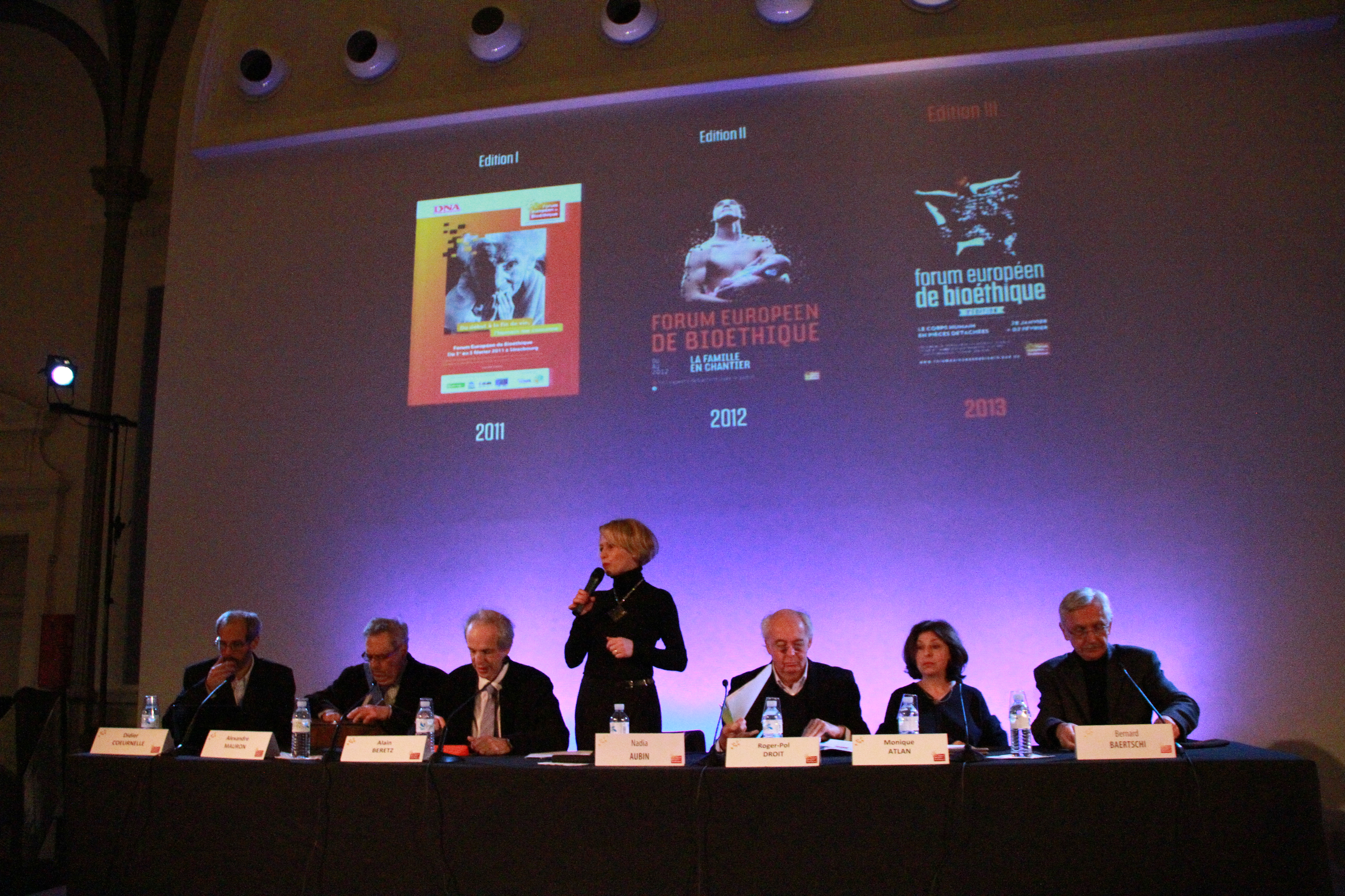 Strasbourg 3ème forum européen de bioéthique 28 janvier 2013